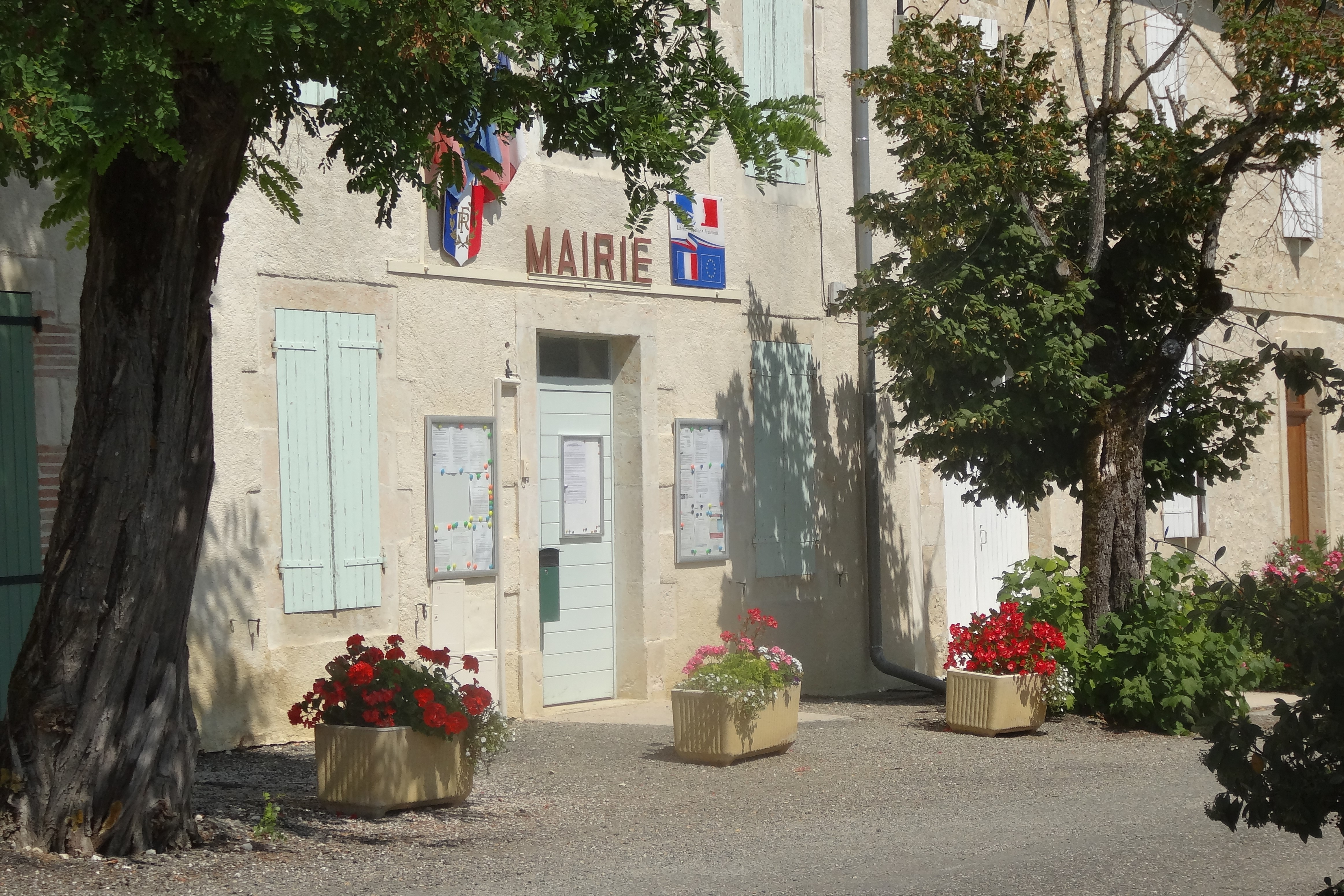 Mairie de Saint-Antonin.